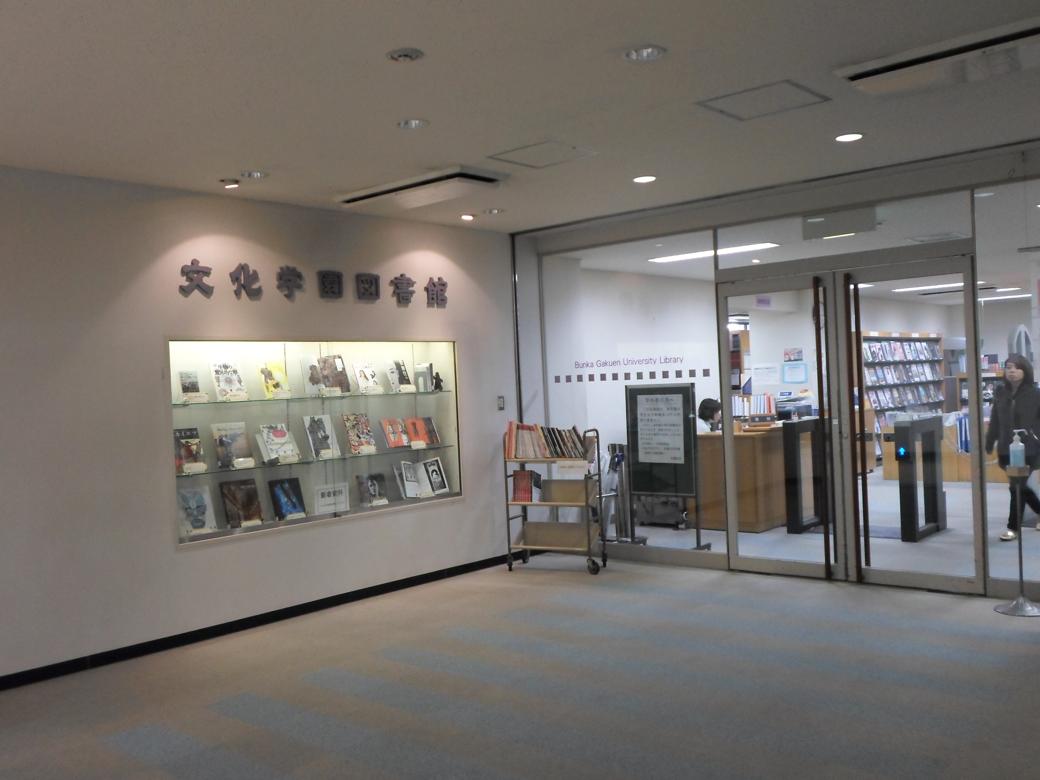 文化学園図書館、日本東京渋谷区文化学園